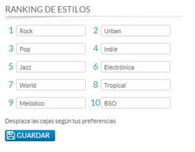 formato click&go